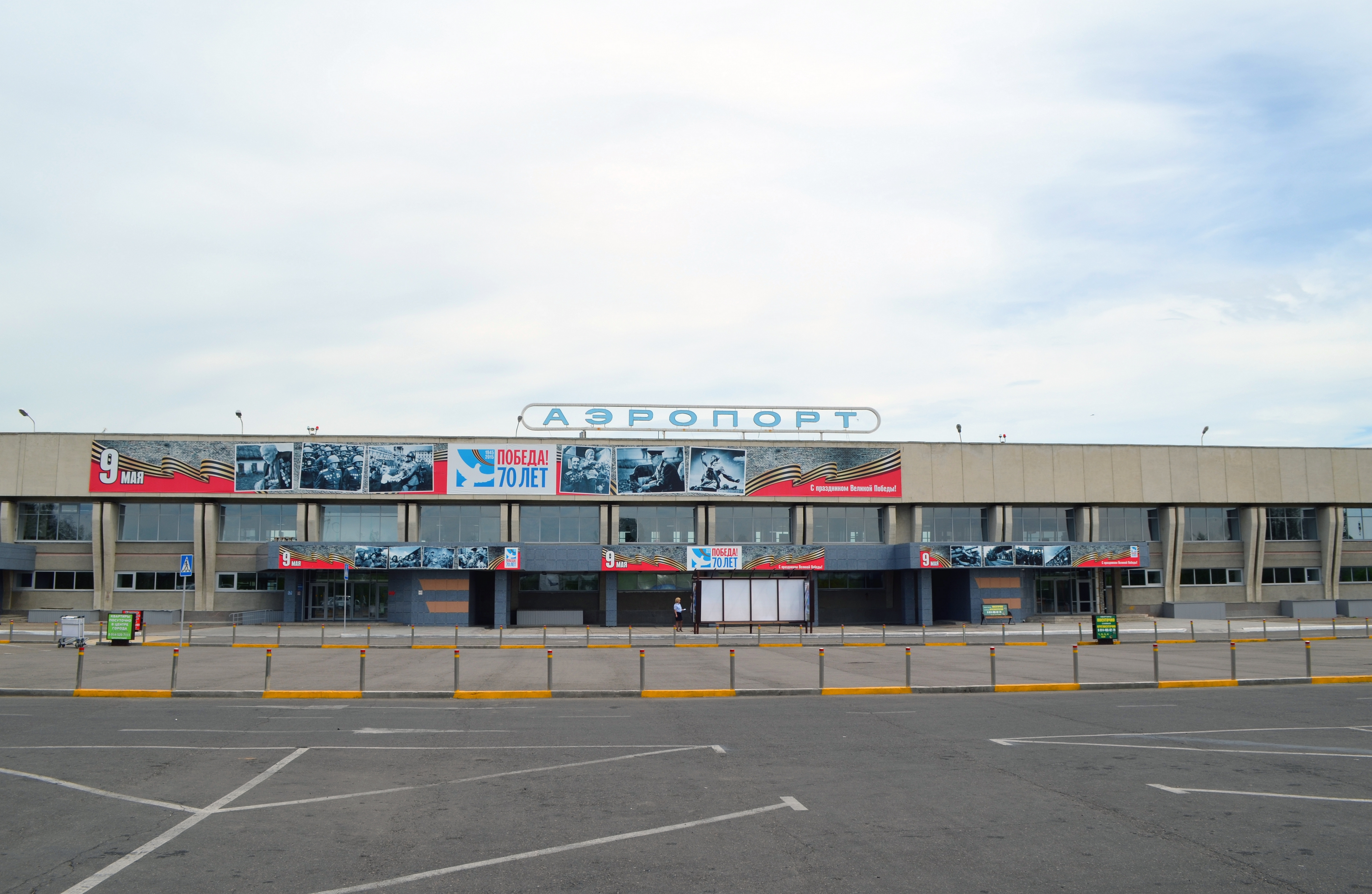 снимки конца июня - начала июля 2015 г.